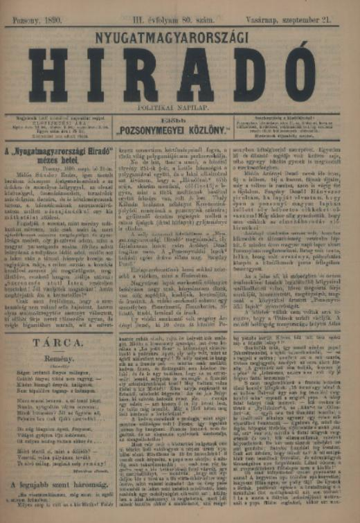 Nyugatmagyarországi Hiradó : Politikai napilap je maďarský politický týždenník, ktorý vychádzal v Bratislave v r. 1890 - 1918.